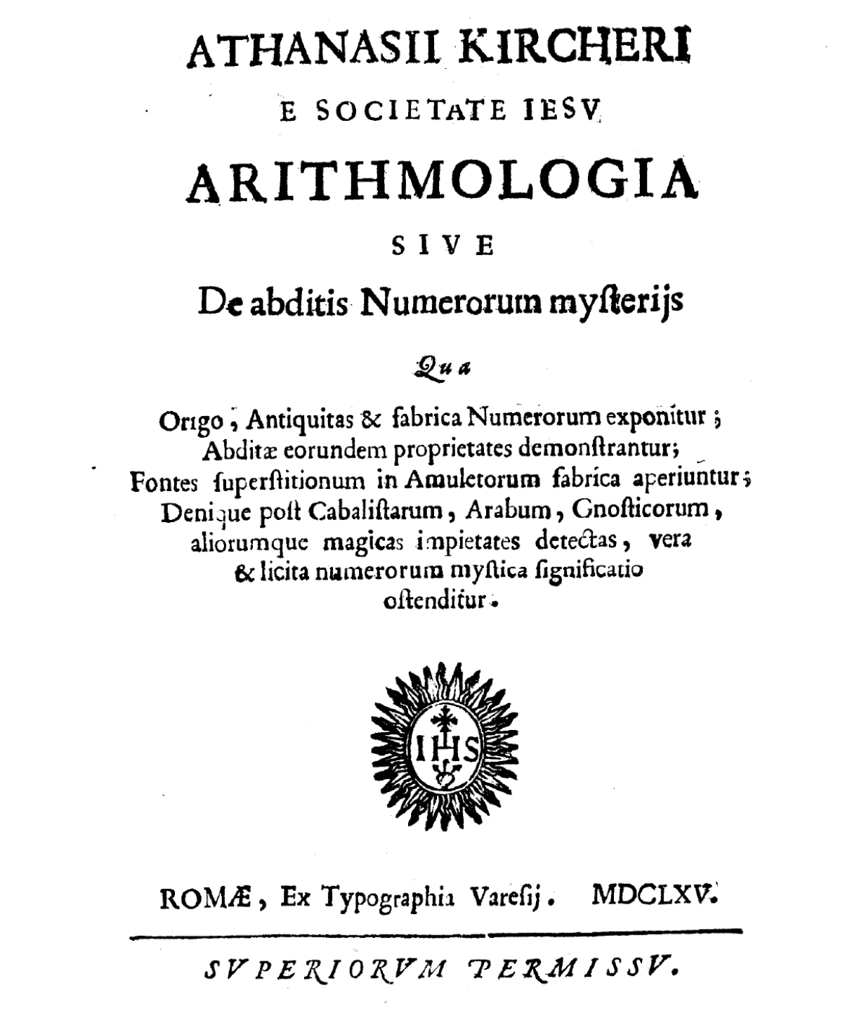 frontespizio di Arithmologia sive De abditis numerorum mysterijs